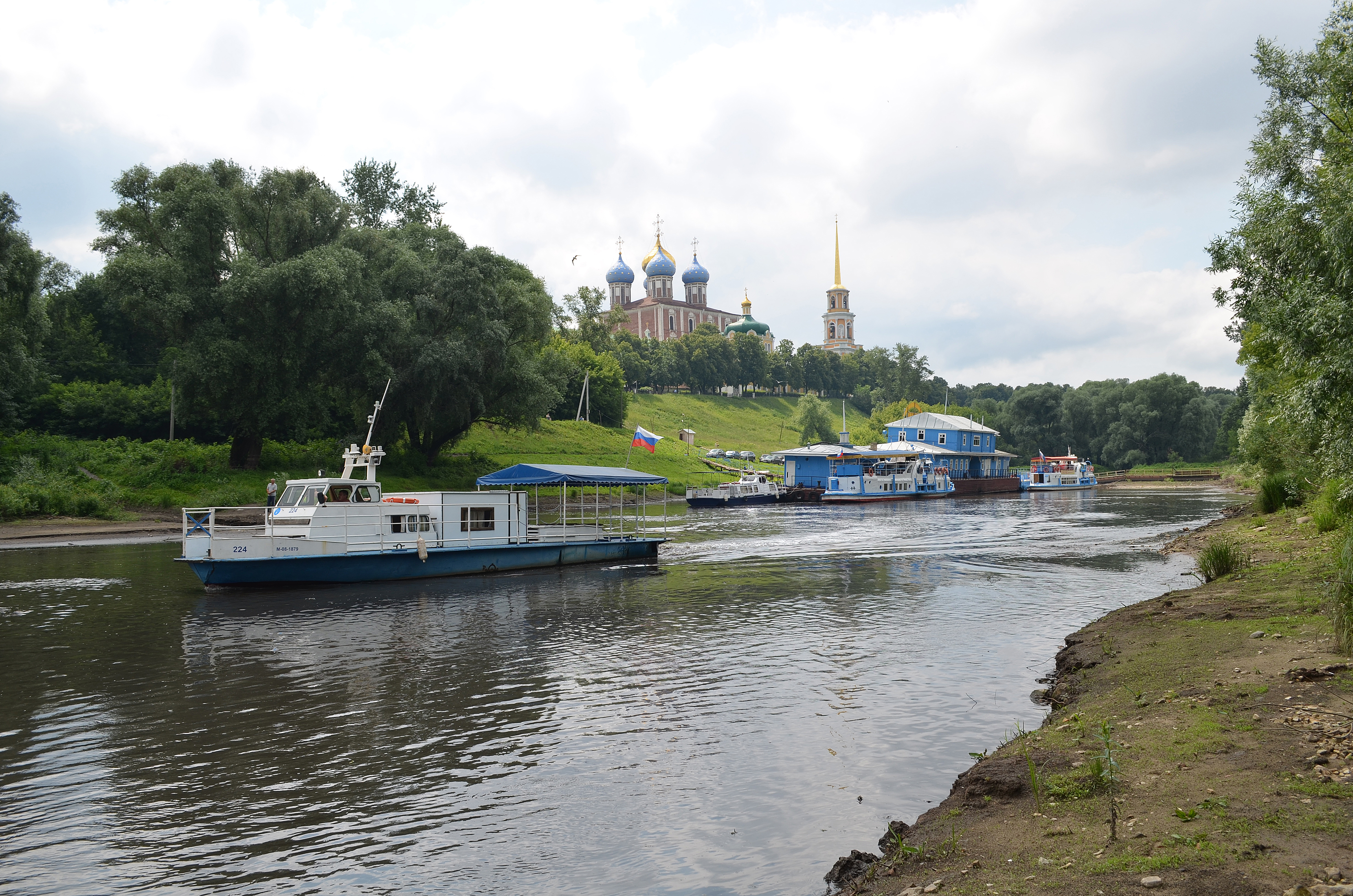 Река Трубеж в районе Рязанского кремля.